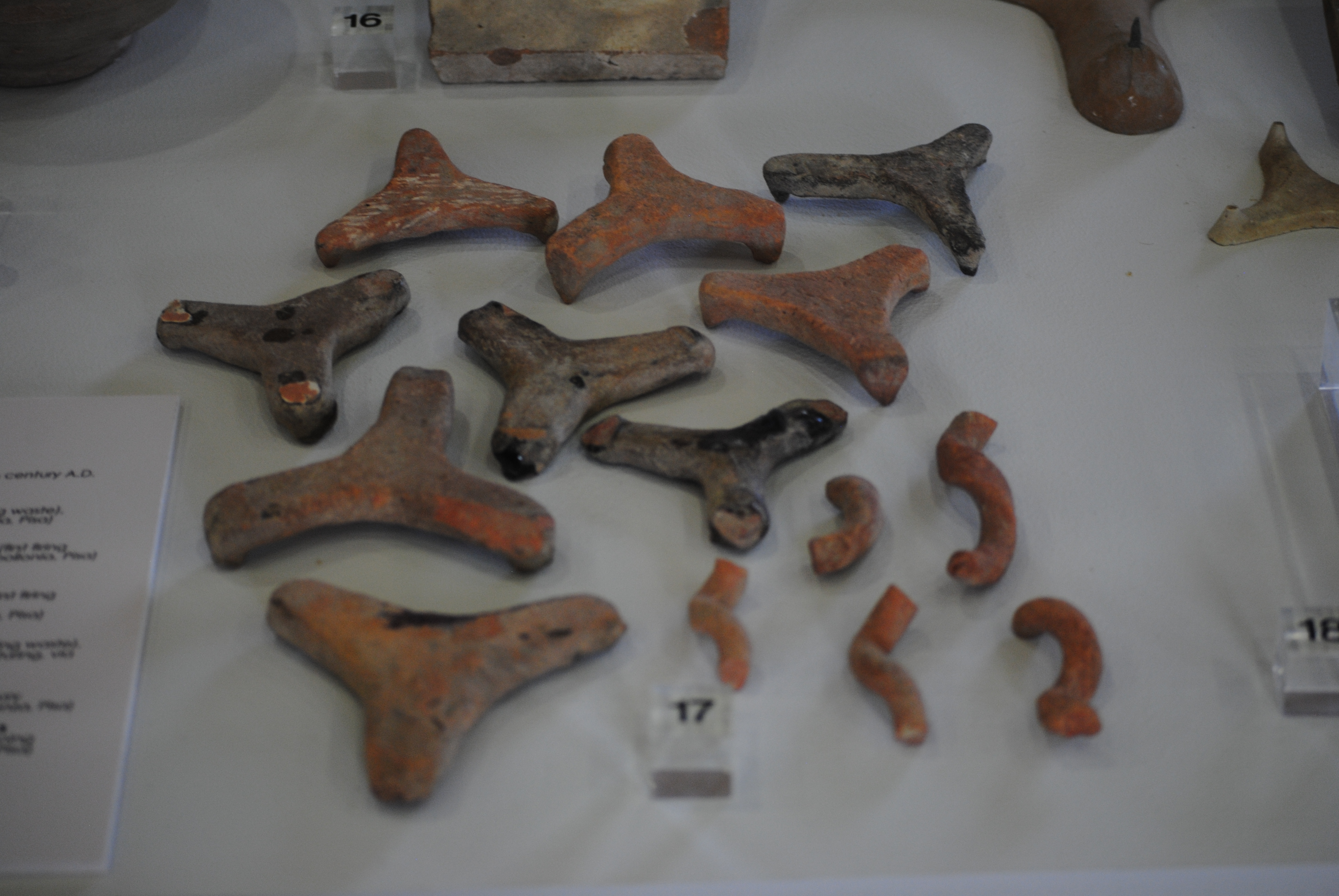 Distanziatori per recipienti aperti (zampe di gallo) usati per separare i pezzi nella fornace durante la prima o la seconda cottura. Museo nazionale - di San Matteo